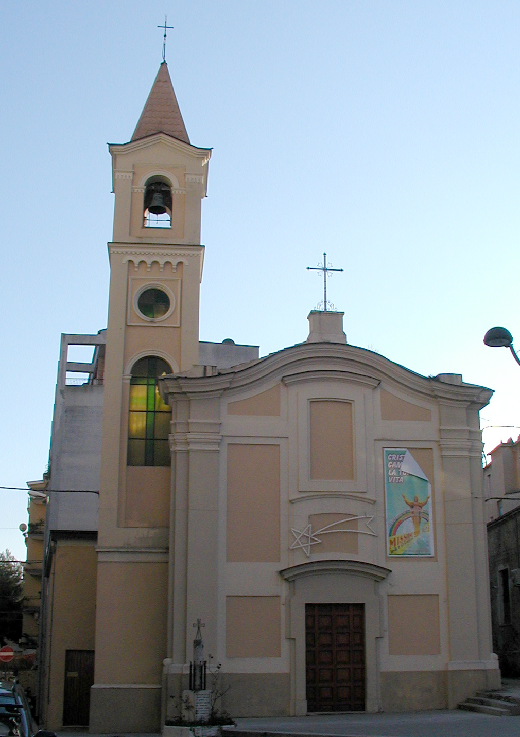 San Rocco (Ortona)